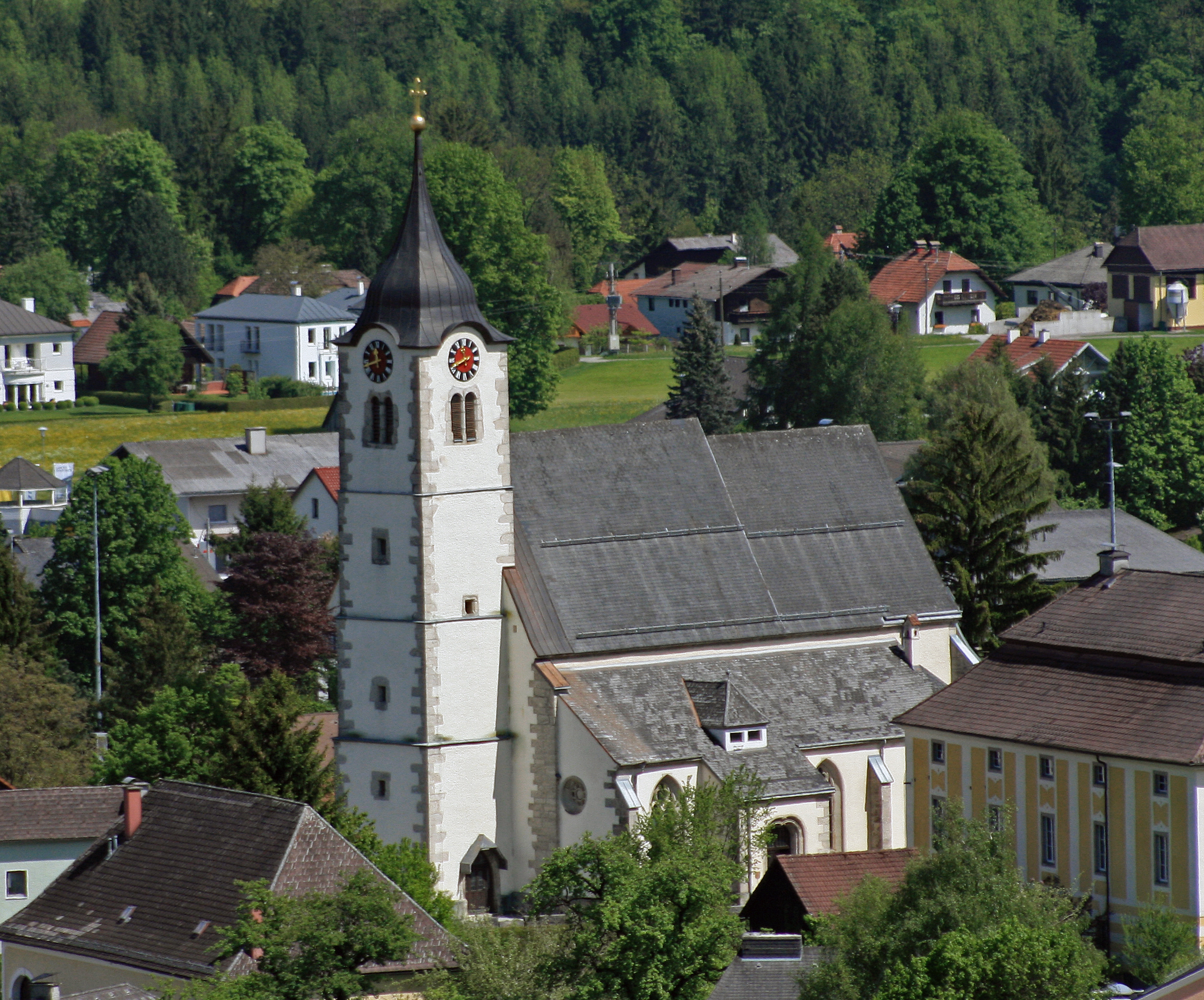 Die Pfarrkirche der oberösterreichischen Marktgemeinde Molln